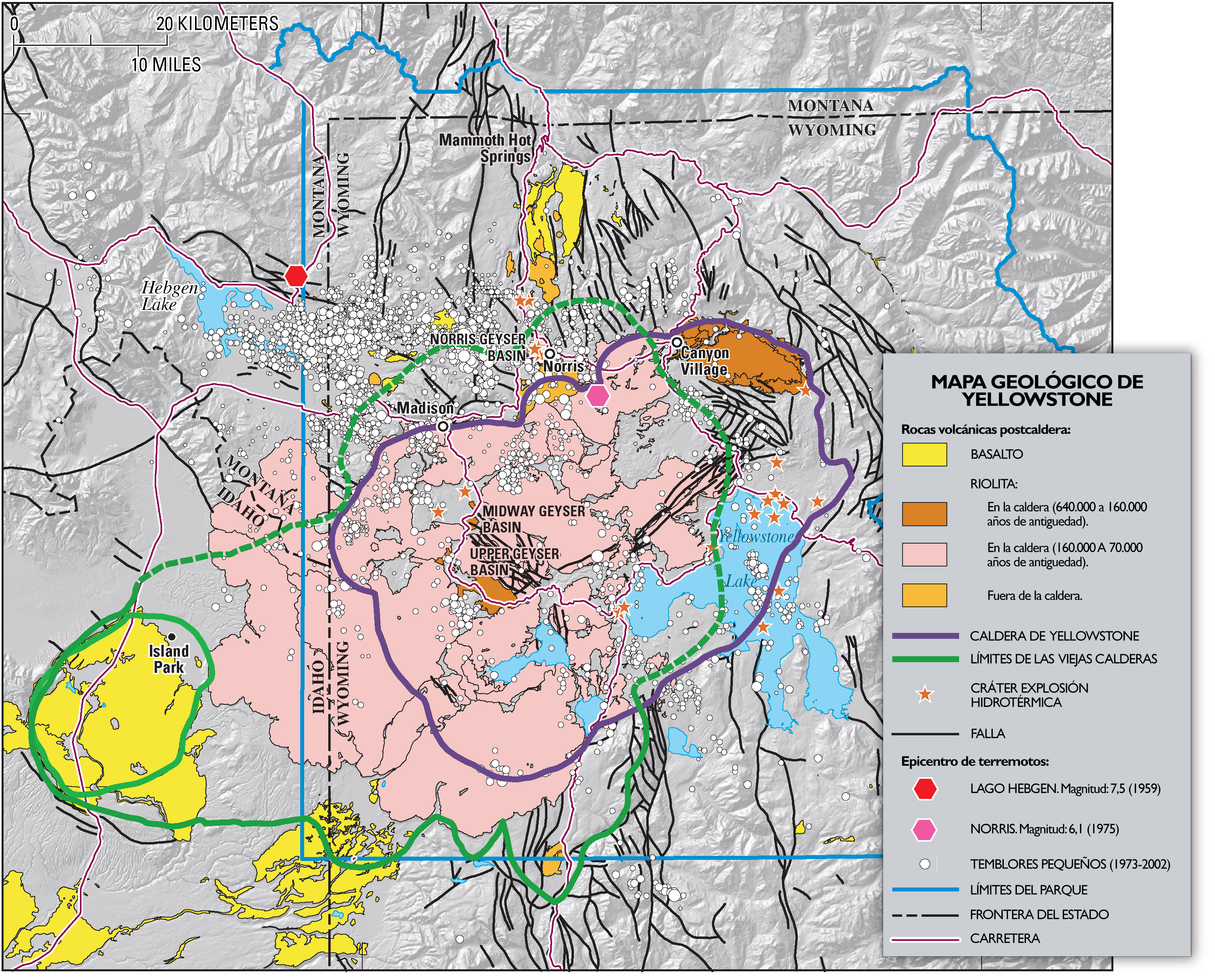 Traducción al español, mapa geológico de Yellowstone. A partir del original de dominio público de la USGS.